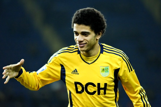 В матче с ФК Волынь